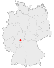 Description: Location of Vogelsberg in Germany Source: Selbst erstellt Photographer/Painter: Ralf Ziegler, --RalfZi 18:06, 29 Mar 2005 (UTC)